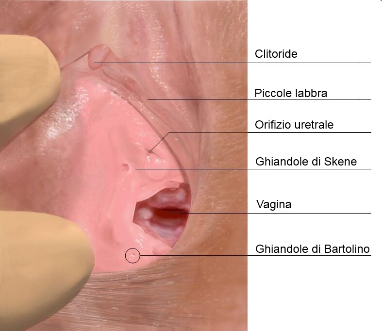 apertura vaginale umana con indicate le ghiandole di Bartolino e di Skene.